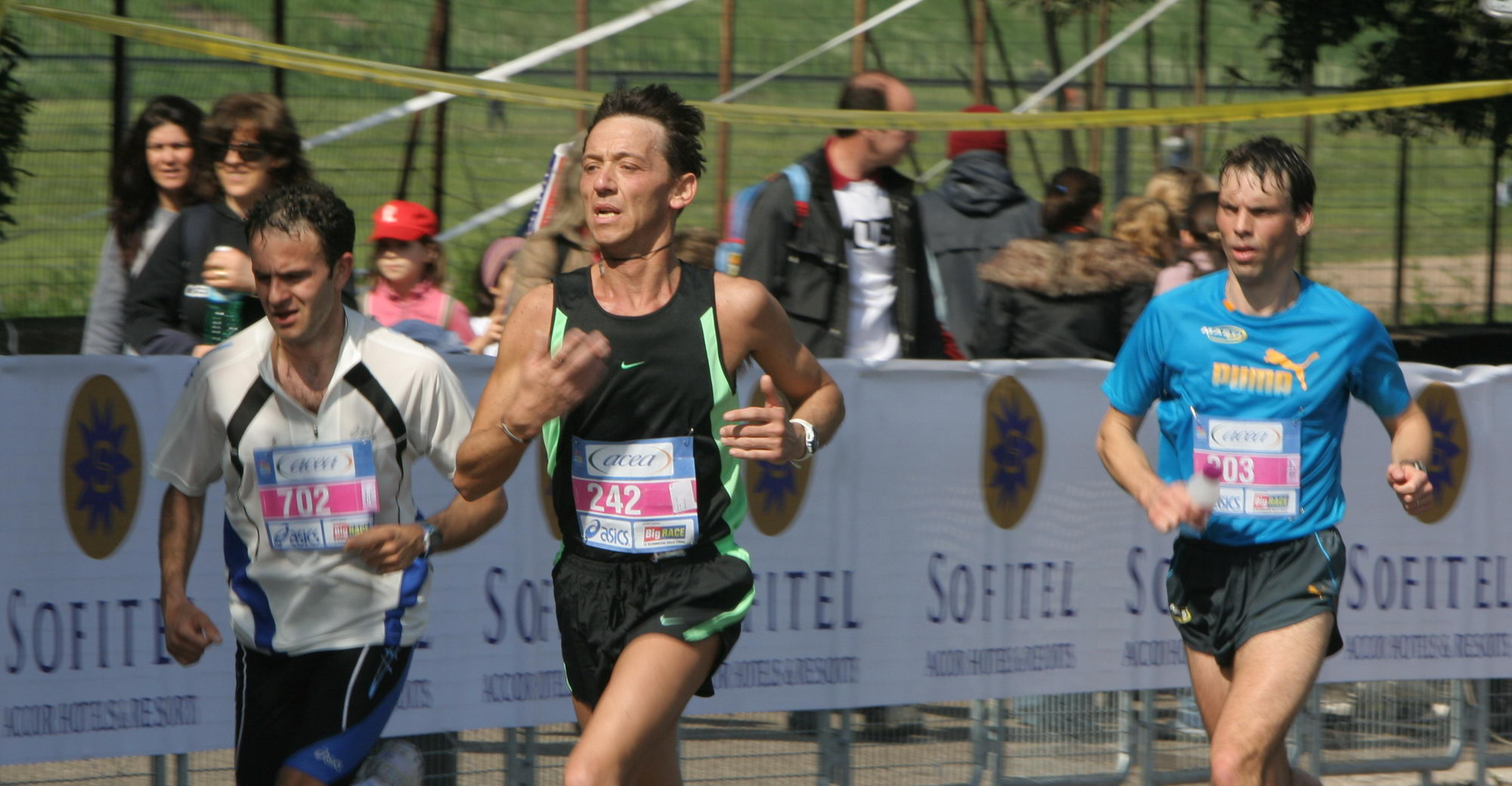 XII edizione della Maratona di Roma, 26 marzo 2006